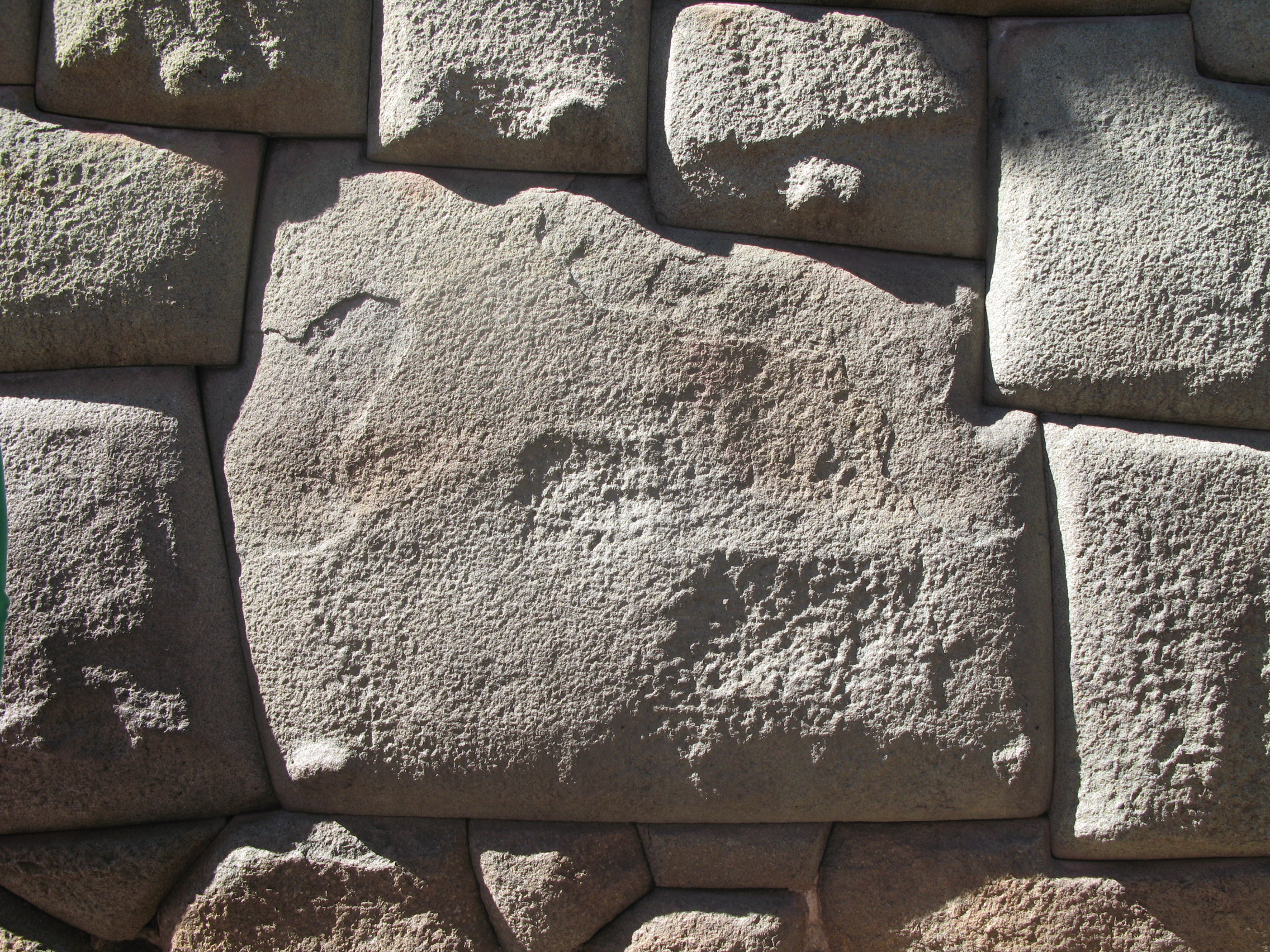 V soseski Barrio de San Blas se vidi "Kamen dvanajstih kotov"